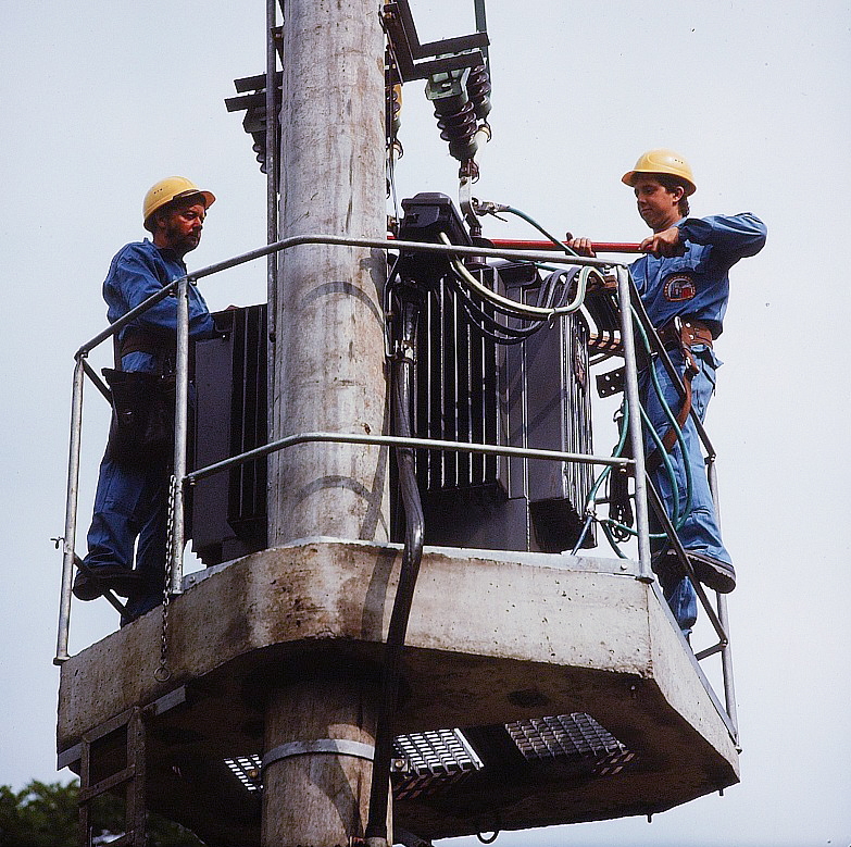 Original image description from the Deutsche Fotothek Elektromonteur